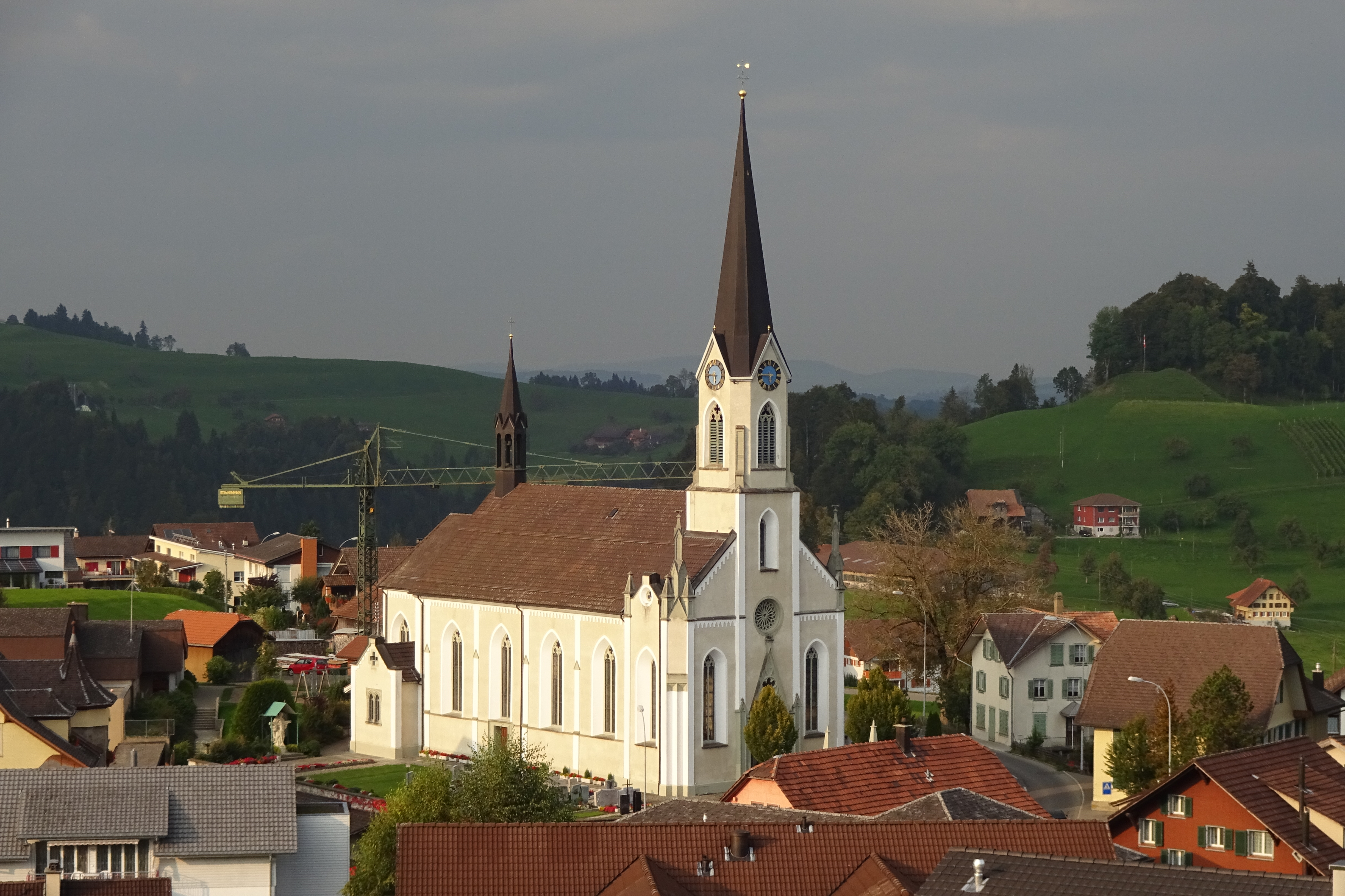 Doppleschwand - Pfarrkirche St.Nikolaus (KGS-Nr 3654): Ortszentrum mit Pfarrkirche von Südwesten (Aufnahmestandort: Stocketli - 47°01’01.56’’ N / 8°03’17.38’’ O)